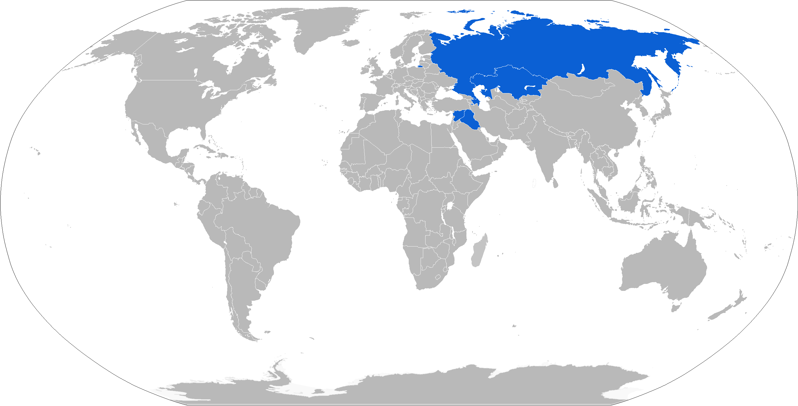 خريطة توضح مستخدمين لراجمة توس